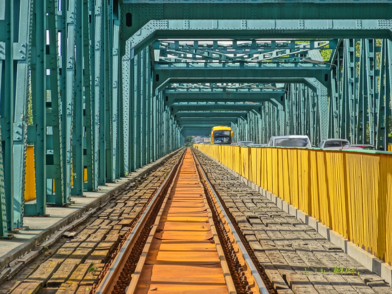 Most fordoński im. Rudolfa Modrzejewskiego nad Wisłą w Bydgoszczy-Fordonie